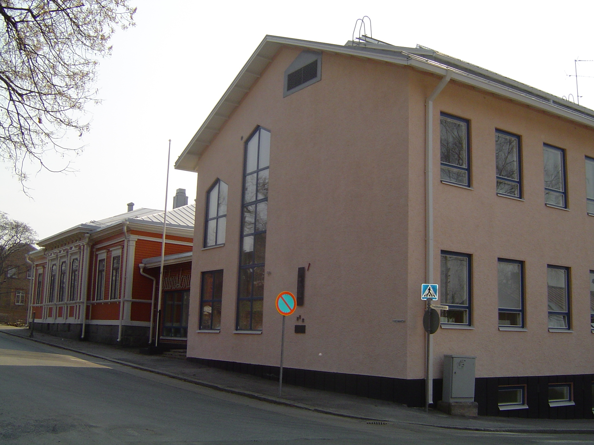 Kuopion talouskoulun julkisivu.